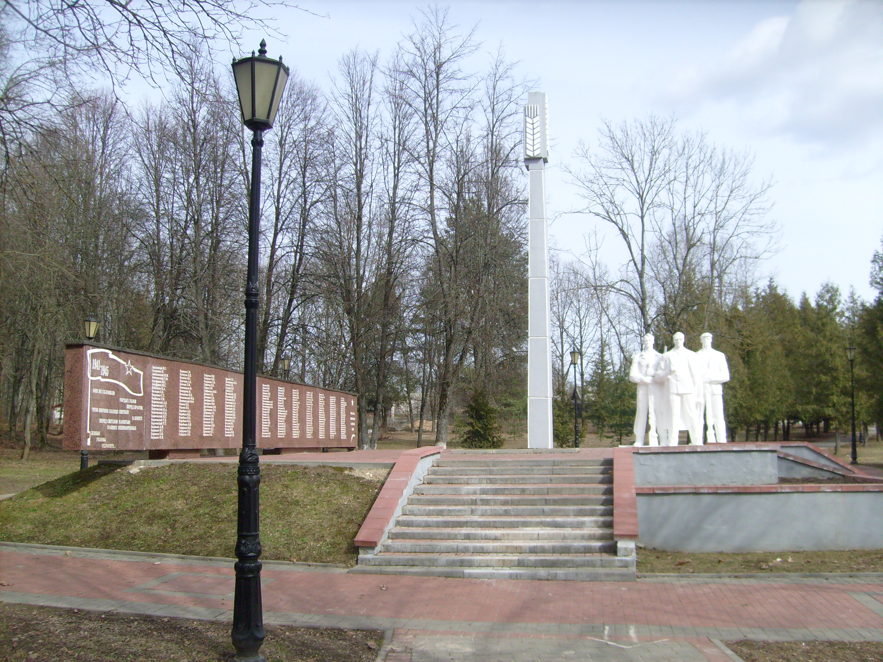 Памятник погибшим в годы войны